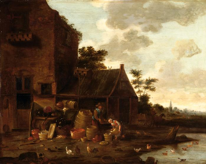 Schilderij Adriaan van der Poel